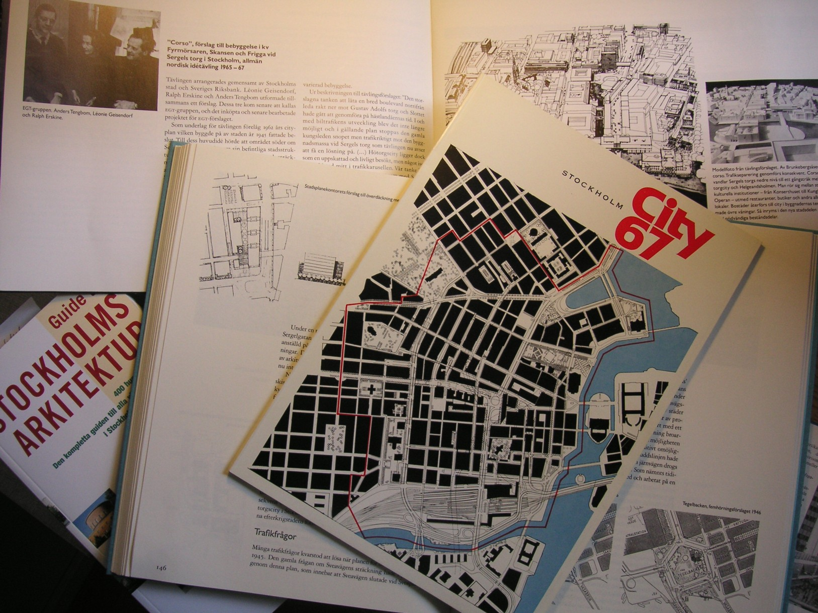 Diverse bygglitteratur